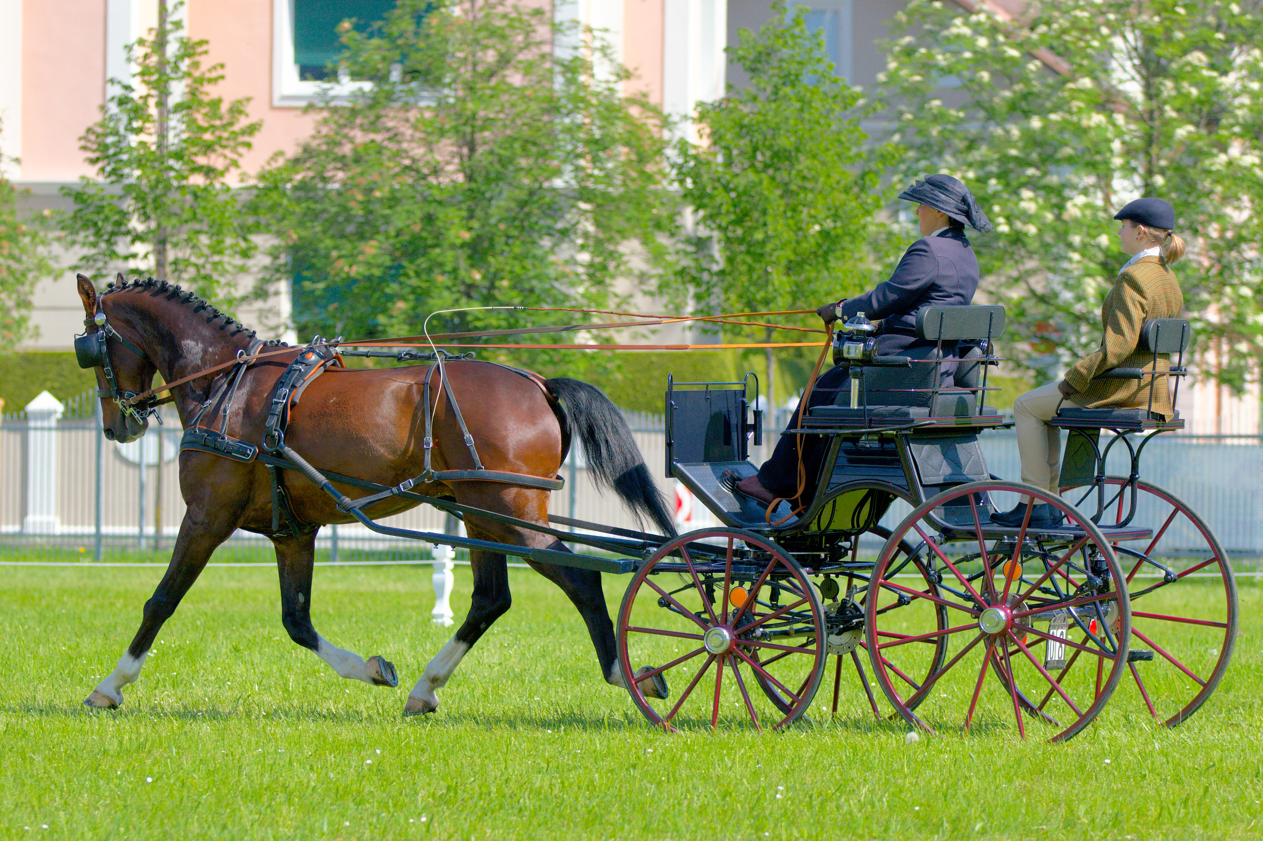 Horse driving at Stiegl brewery in Salzburg